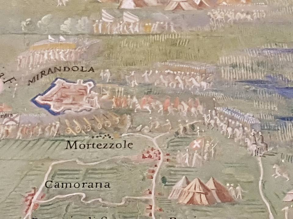 Particolare dell'assedio della Mirandola di Papa Giulio II della Rovere del 1511 nell'affresco del Ferrariae Ducatus (Ducato di Ferrara) nella mappa n° 275 della Galleria delle carte geografiche dei Musei Vaticani a Roma.